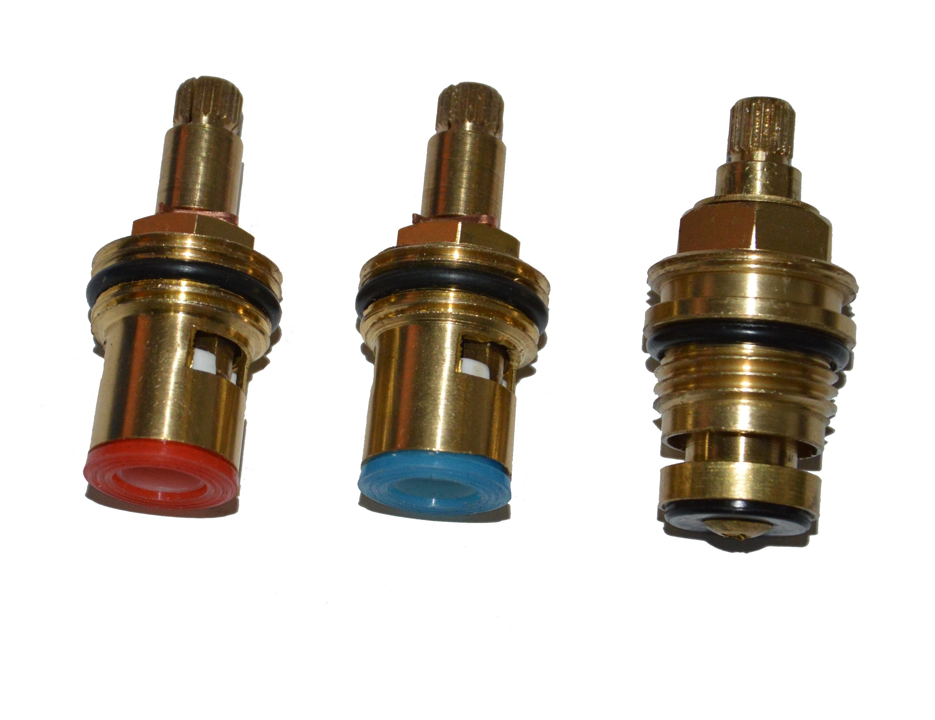 Разновидности импортных кран-букс.